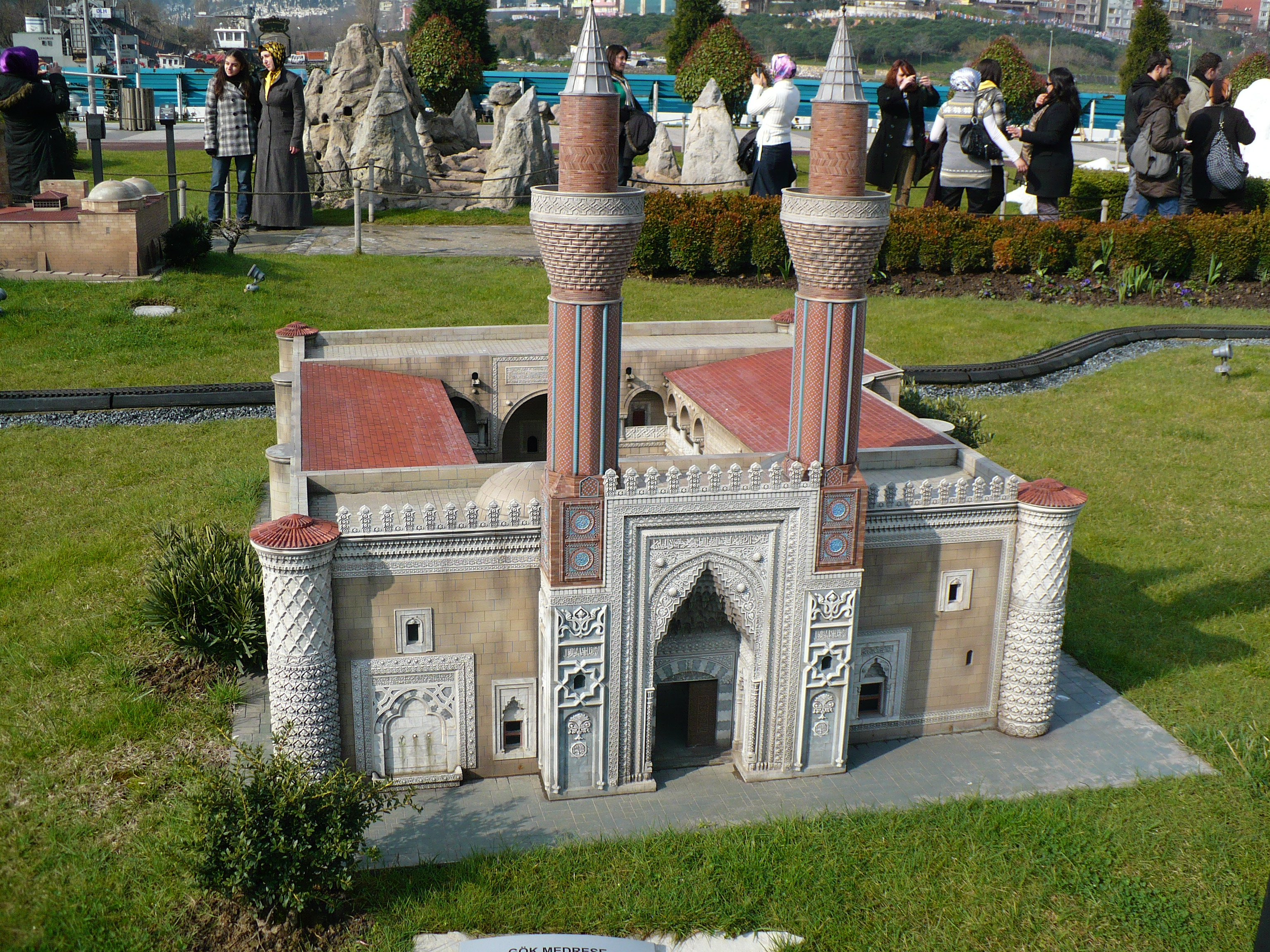 Miniatürk İstanbul'dan görüntüler